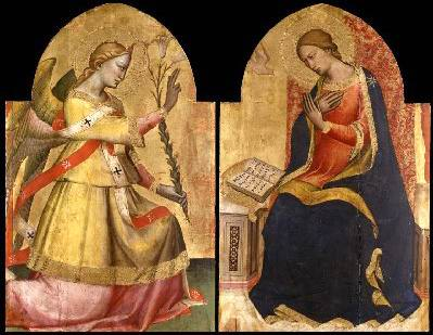 Annunciation